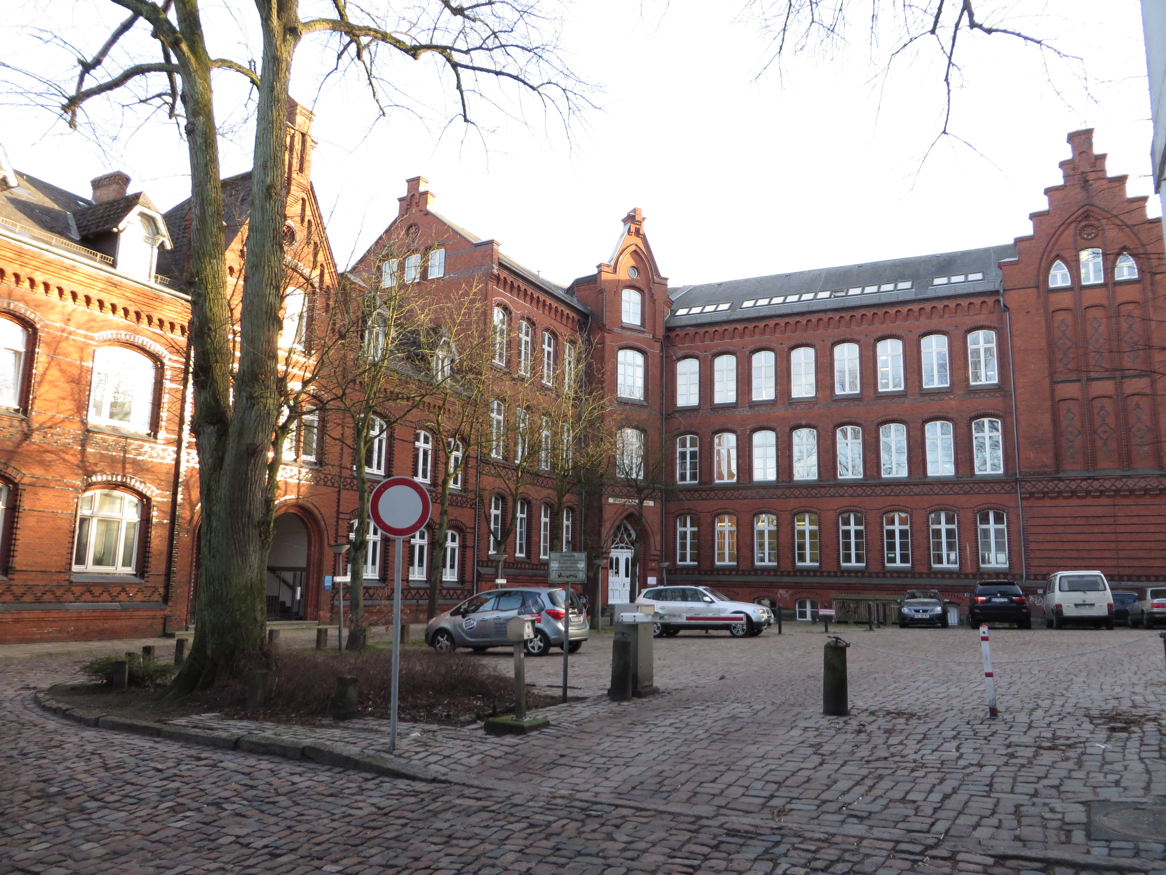 Marien-Schule (Flensburg Februar 2015), Bild 02